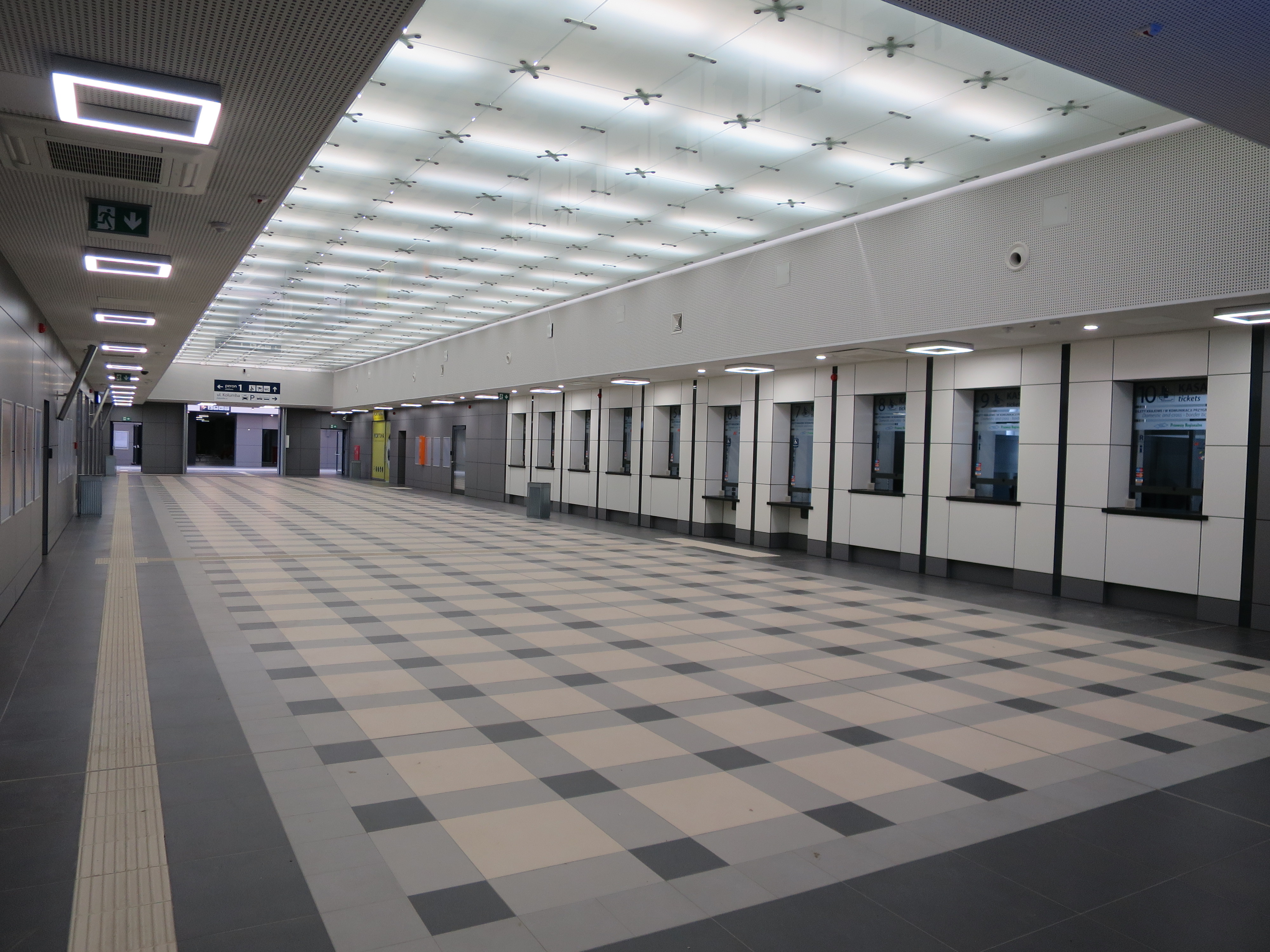 Szczecin Główny po modernizacji zakończonej 29.04.2016 r.